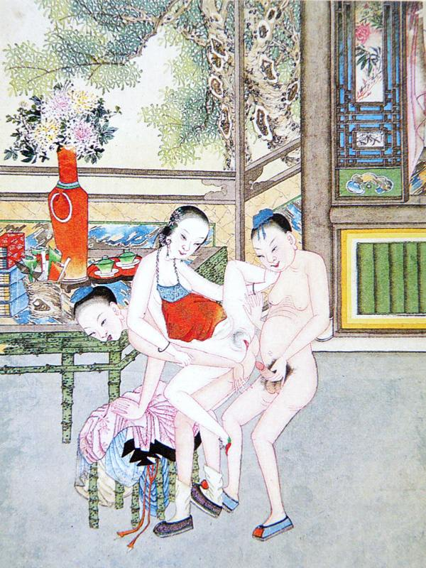 中文（香港）: 清代春宮圖